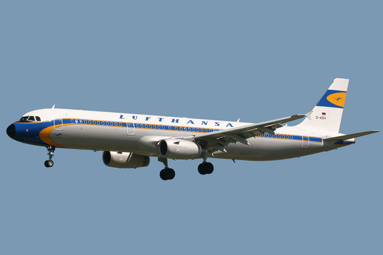 Barcelona El Prat (LEBL/BCN) Airport